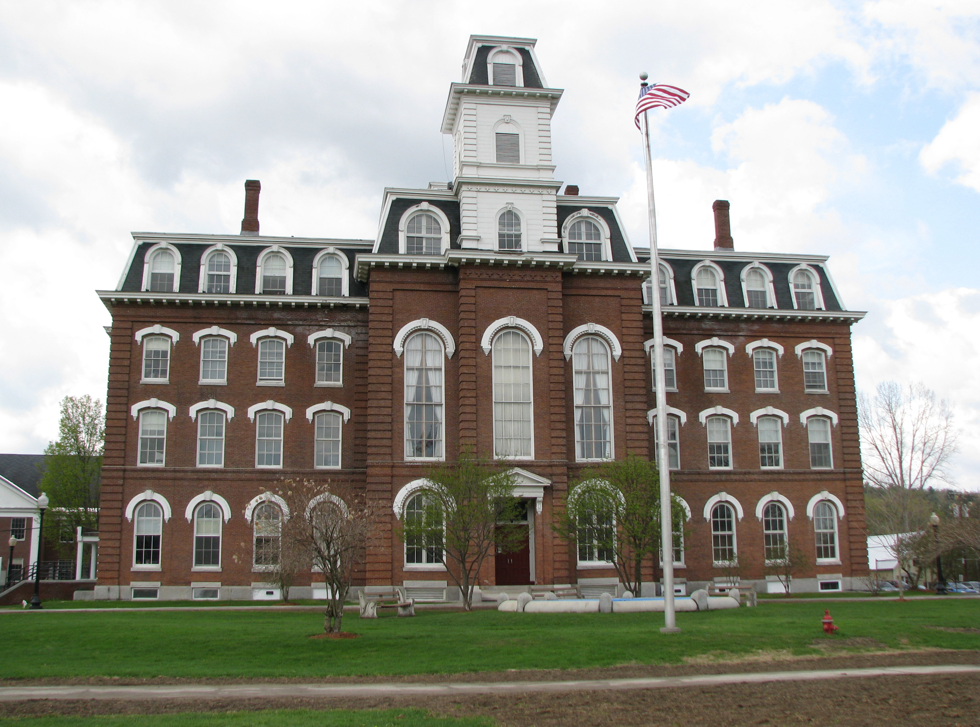 Vermont College--College Hall